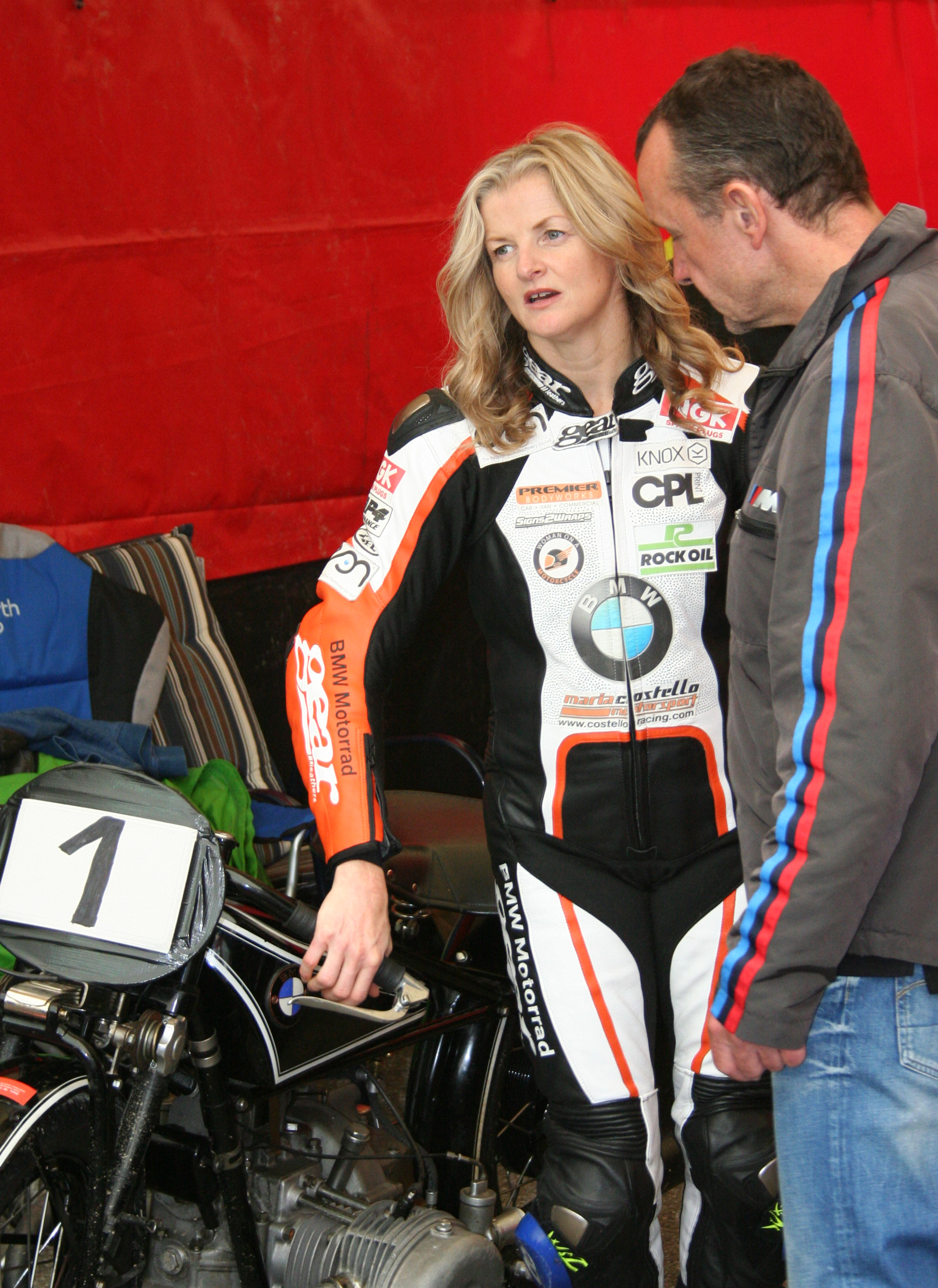 Maria Costello MBE, beim Oldtimer Grand Prix 2016 in Schwanenstadt